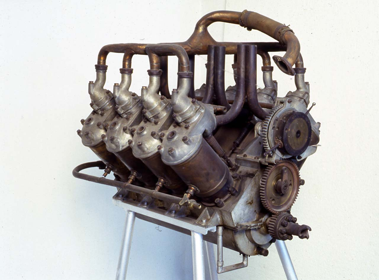 Motore a 8 cilindri disposti a V con angolo di 90°, raffreddato ad evaporazione. I cilindri sono in acciaio tornito con teste fucinate in acciaio. Le camicie per l'acqua di raffreddamento sono rivestite di rame depositato elettroliticamente. Le valvole sono laterali, disposte ad L; la valvola di aspirazione è automatica, mentre la valvola di scarico è comandata da una albero a camme sistemato entro la V dei cilindri, all'interno del carter Il basamento è realizzato in alluminio fuso. La disposizione dei cilindri è tale per cui i cilindri di una fila risultano sfalsati rispetto i cilindri dell'altra in modo tale che due bielle opposte risultano attaccate alla stessa manovella. Notizie storico-critiche La famiglia di motori Antoinette venne battezzata con questo nome in onore alla figlia di Jules Gastambide, socio e finanziatore delle attività di Levavasseur fin dal 1902. I motori progettati da Levavasseur furono i primi motori aeronautici realizzati in Europa. Già nel 1903 infatti Levavasseur fu in grado di progettare un motore in grado si sviluppare le doti di potenza necessarie per il decollo in un peso contenuto. Il sistema di refrigerazione evaporativo si basava sulla parziale evaporazione dell'acqua all'interno delle camicie dei cilindri, inviata poi a condensare in un condensatore posto sui fianchi della fusoliera. I motori Antoinette furono montati sui aerei di Santos Dumont con cui, nel 1906, si eseguirono i primi voli sul campo di aviazione di Bagatelle, presso Parigi. Montati sugli aerei di Bleriot, Ferber, Farman e Voisin, i motori Antoinette tra il 1906 e il 1908 riuscirono ad ottenere numerosi primati nelle varie esibizioni aviatorie. L'esemplare posseduto dal Museo Nazionale della Scienza e della Tecnologia "Leonardo da Vinci" è stato donato dalla società Leonardo da Vinci, fondata da Enrico Forlanini nel 1907, ed è probabile che sia stato adoperato dallo stesso Forlanini nel corso delle sue sperimentazioni sulla propulsione dei dirigibili.